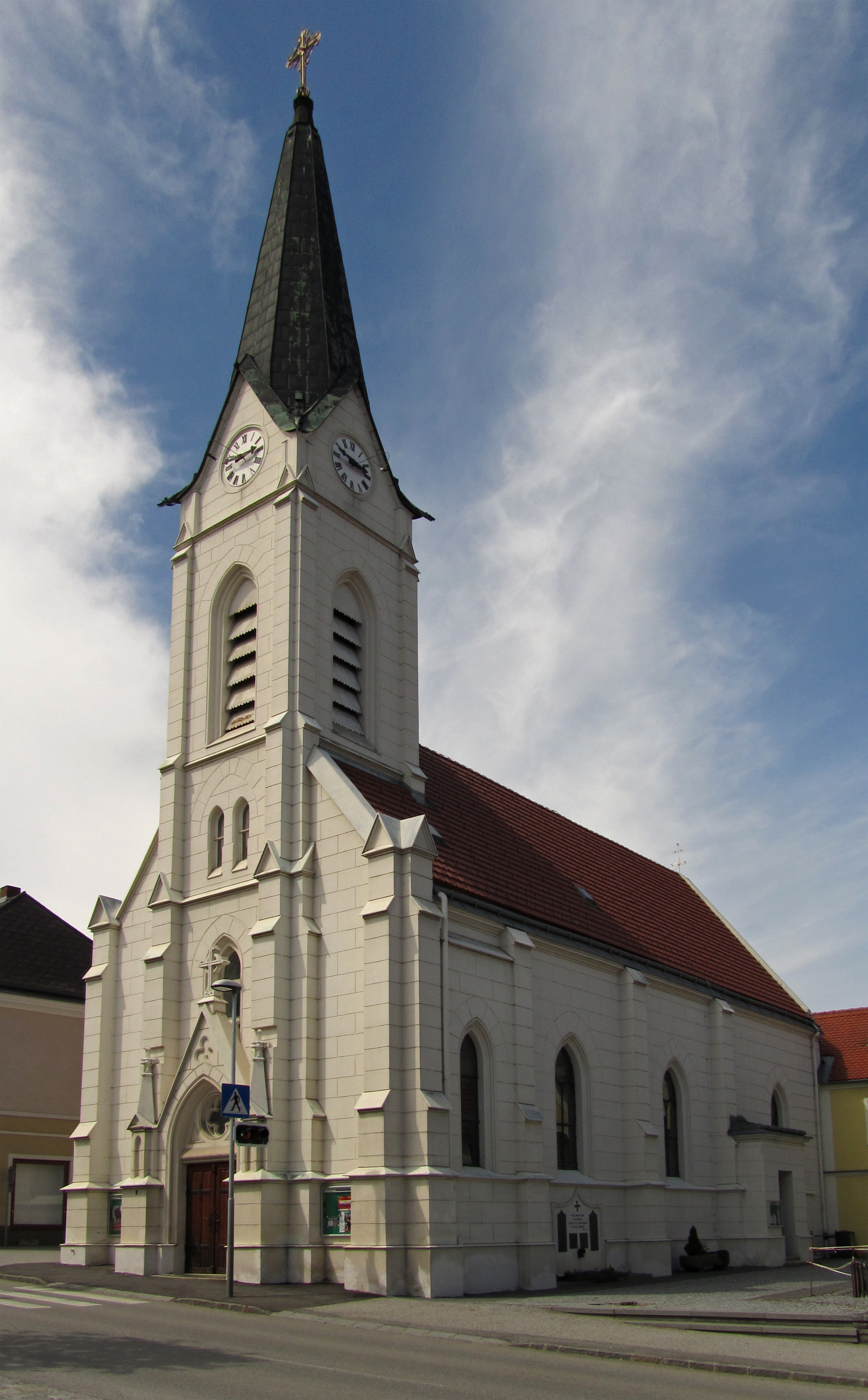 Kath. Pfarrkirche Herz Mariae in Schwarzenau (Niederösterreich)